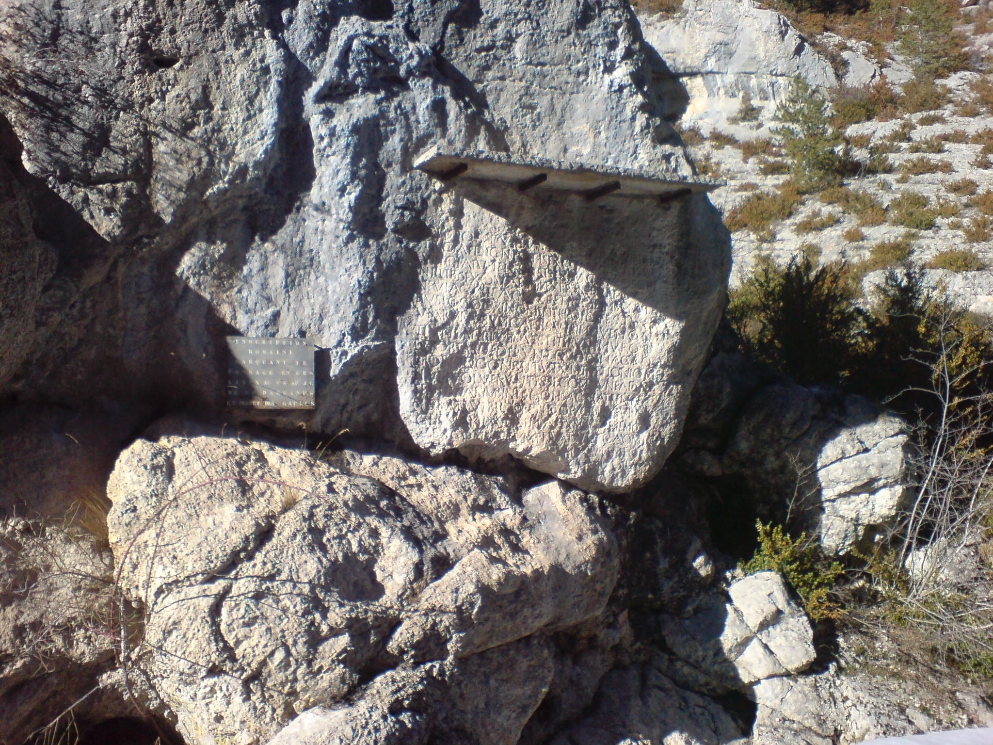 Inscription latine du Template:IVe siècle ; auteur : Caïus Posthumus Dardanus, préfet du prétoire, correspondant de saint Augustin d’Hippone et de saint Jérôme de Stridon. Situation : défilé de Pierre-Écrite, commune de Saint-Geniez